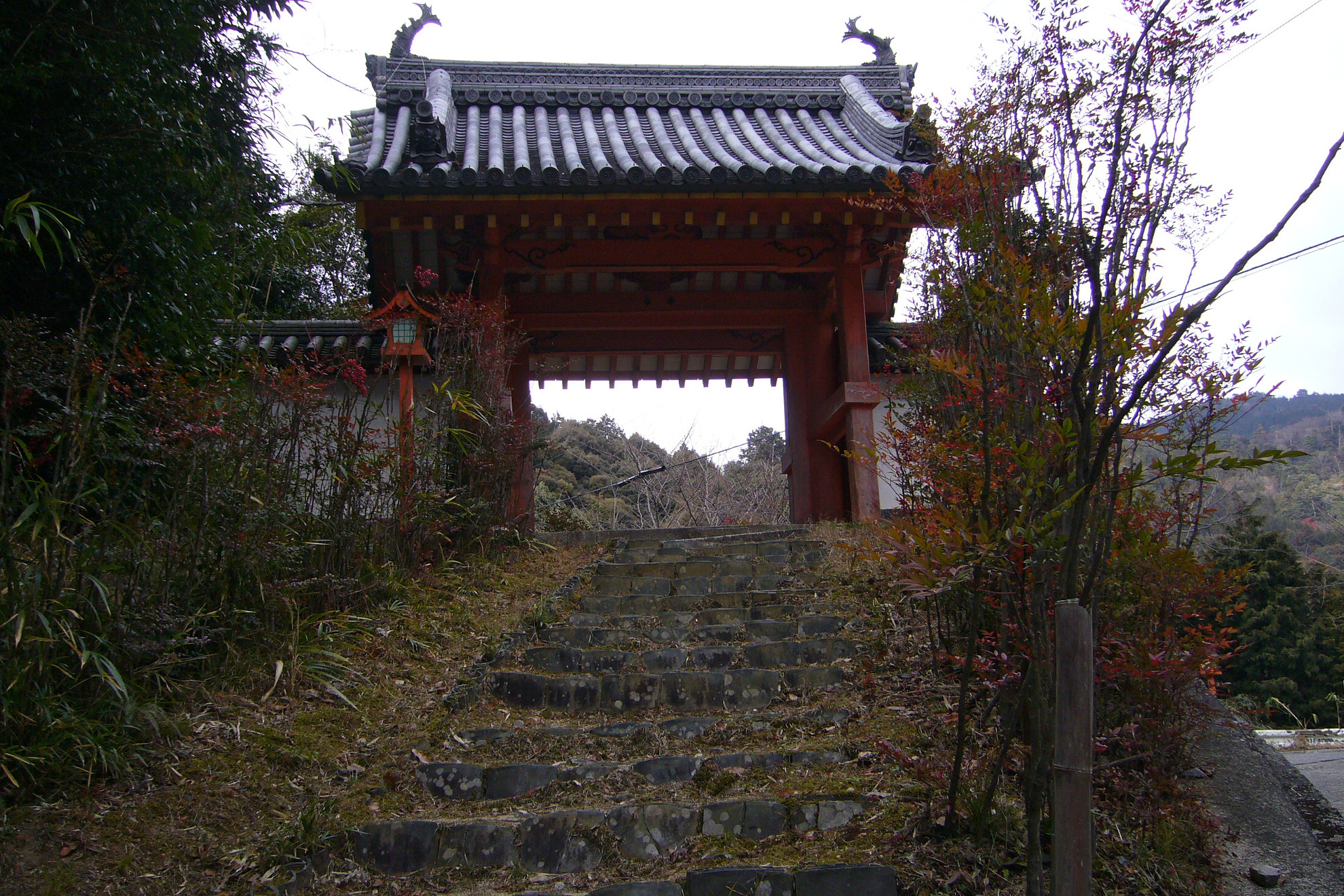 Kaijusenji, Kamo, Soraku-gun, Kyoto, Japan